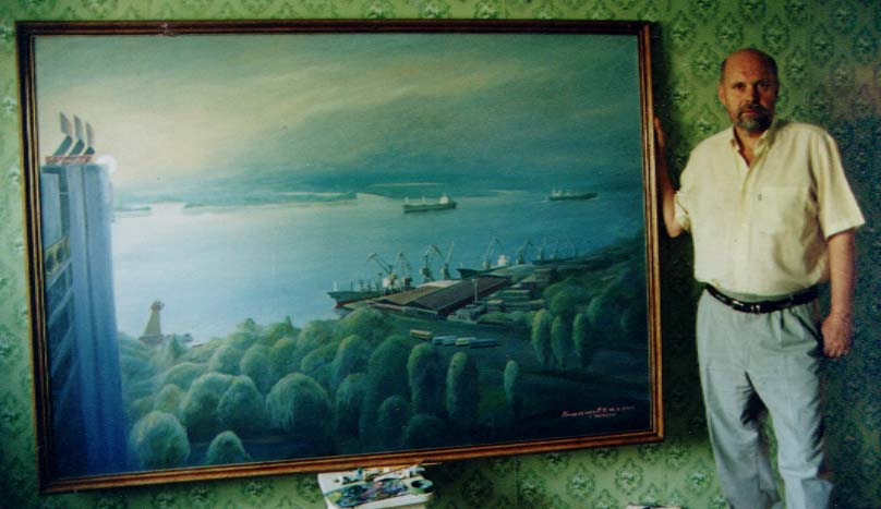 Владимир Кравченко возле своей работы «Утро» (херсонский пейзаж)